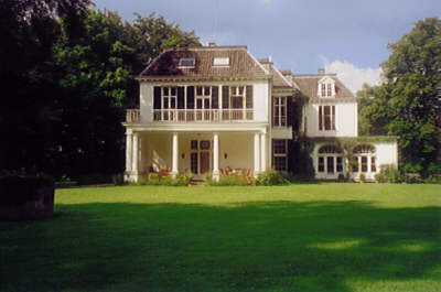 Zelfgemaakte media, Wedigo v. Wedel, Eeefde, 2003